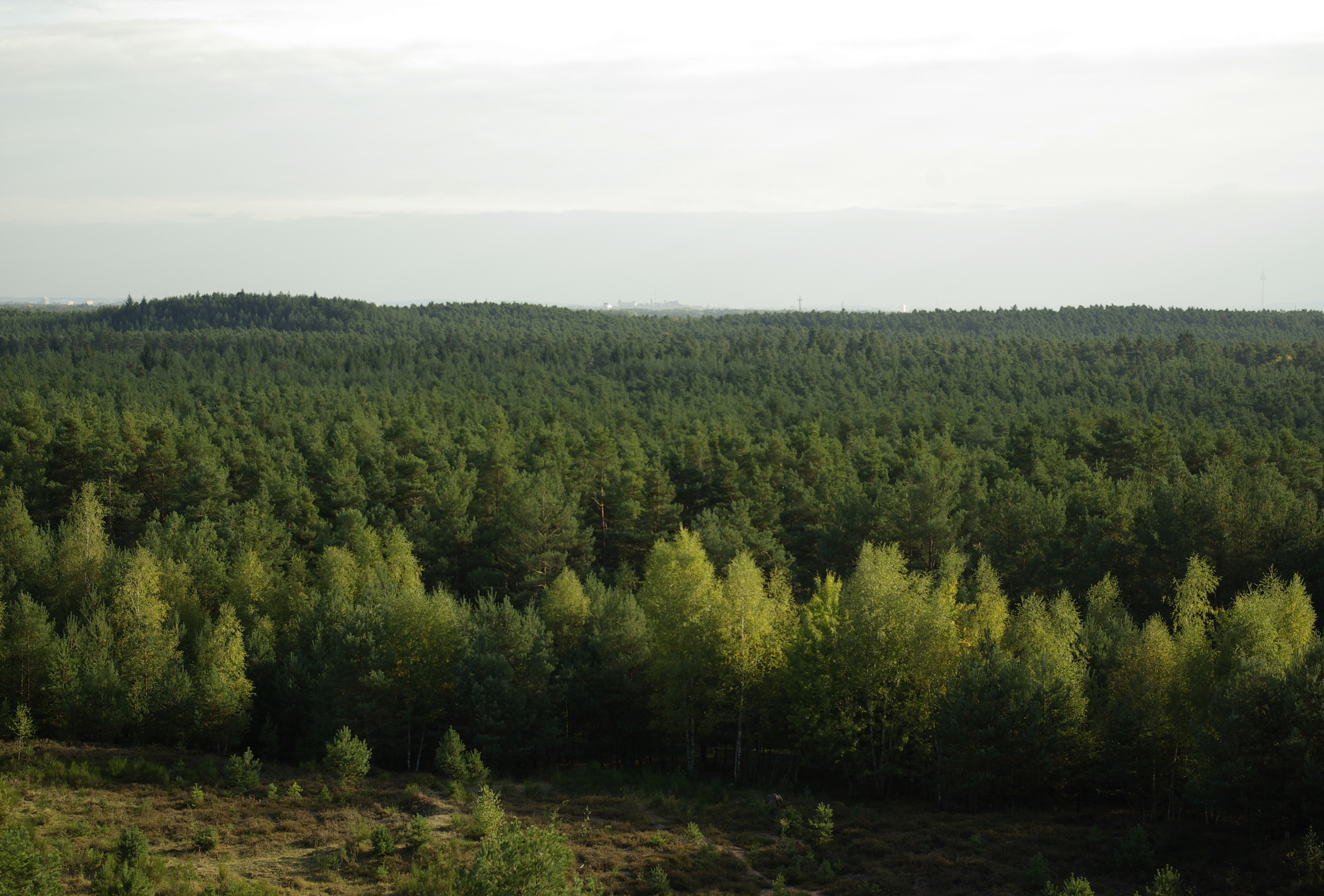 Blick vom Naturschutzgebiet Tennenloher Forst nach Nürnberg.